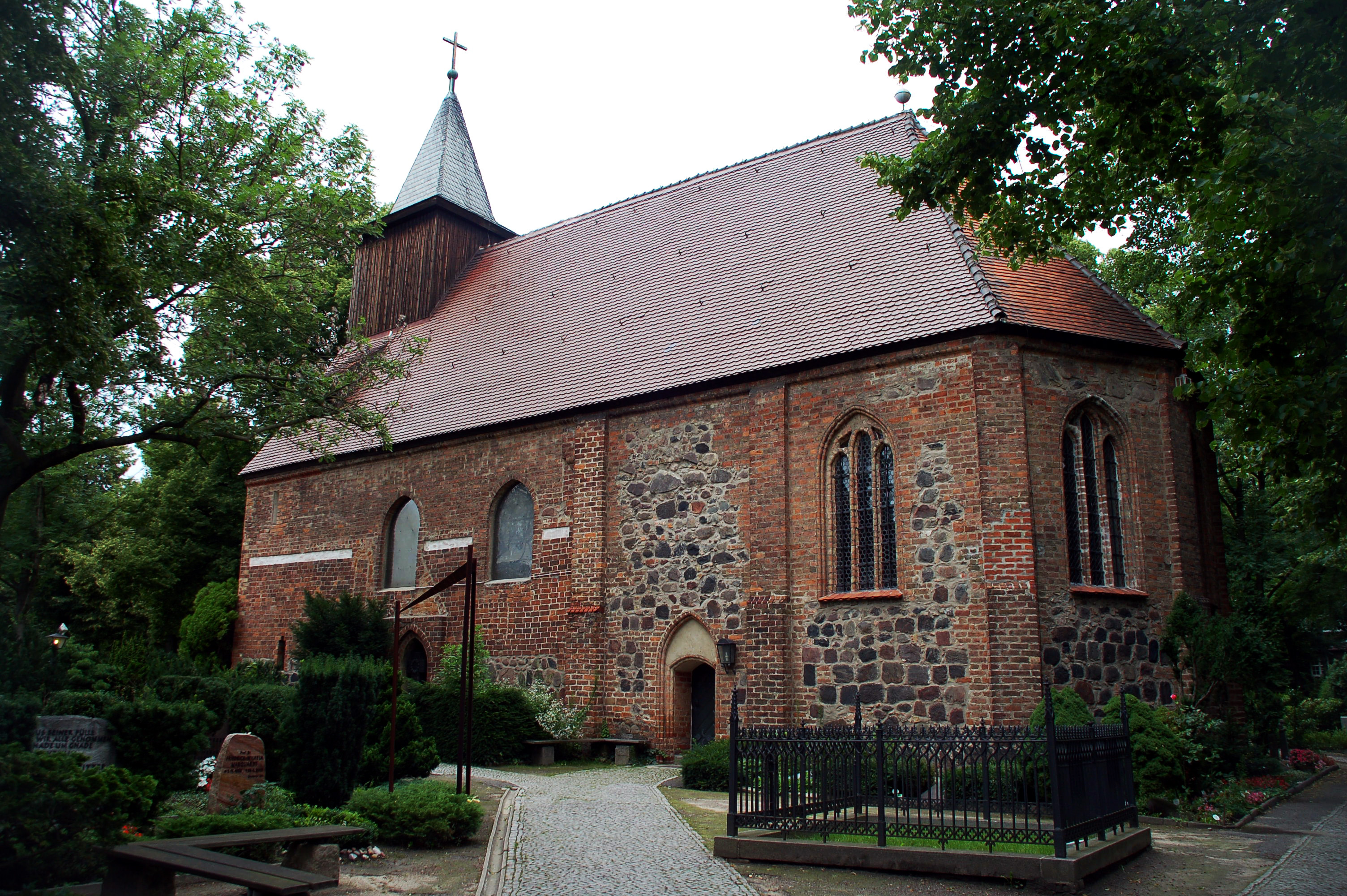 picture shows St.-Annen-Kirche. Berlin-Dahlem 2007, Germany